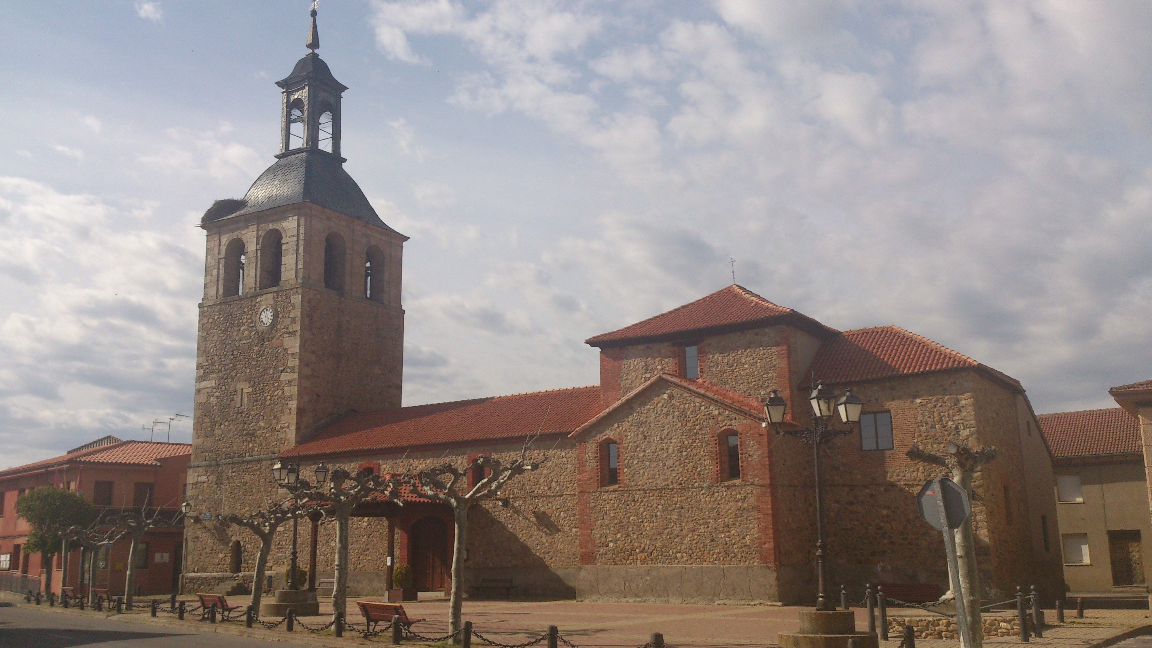 Iglesia Llamas de La Ribera